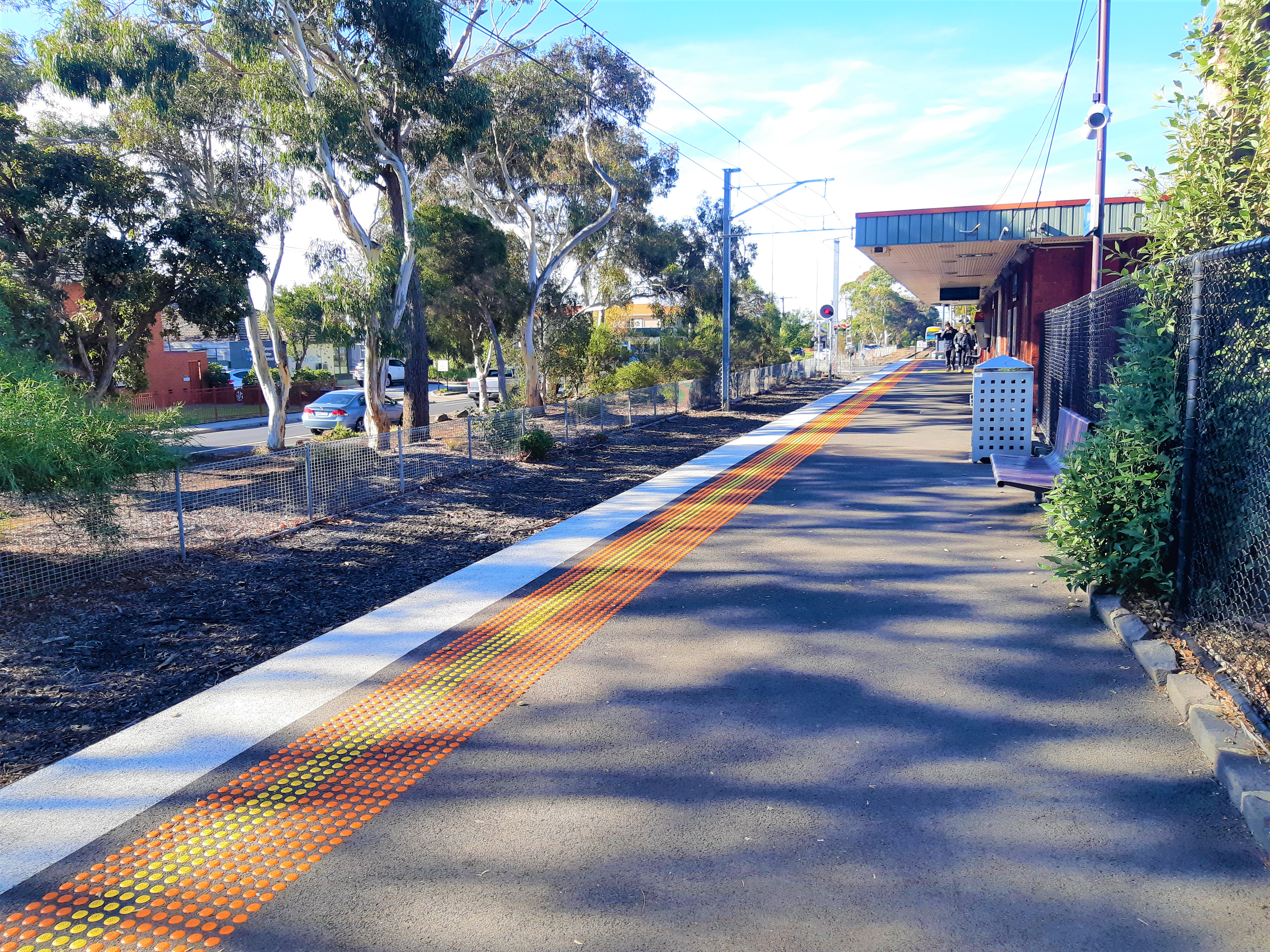 Stasiun kereta api Altona di Melbourne.